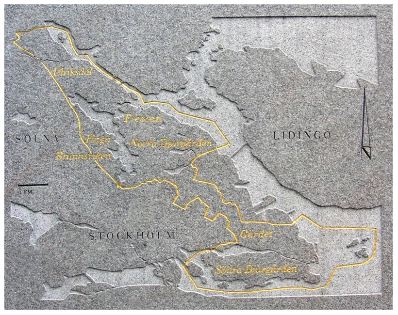 Ekoparken minnessten